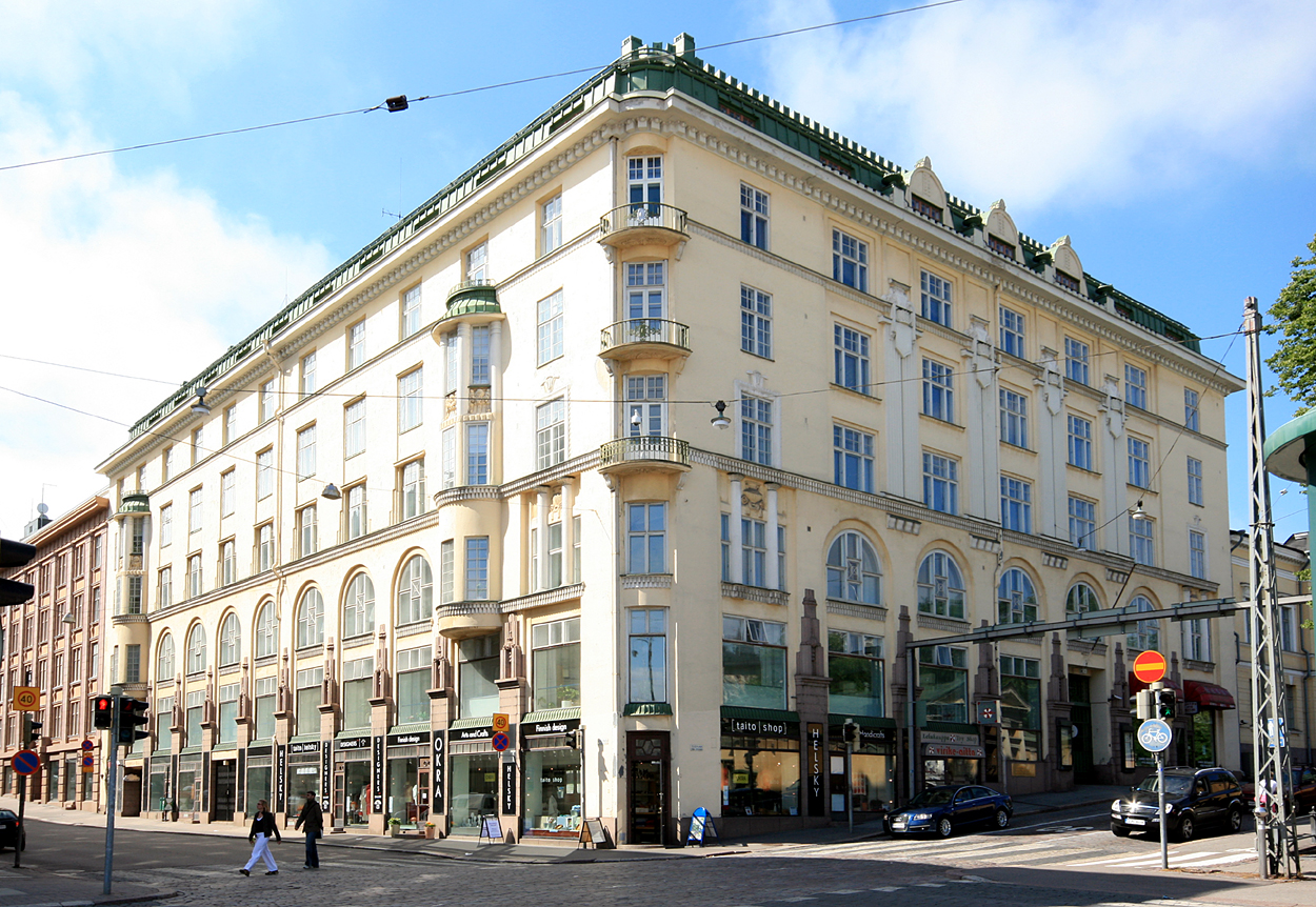 Unioninkatu 26 / Eteläesplanadi 4, Helsinki. Arkkitehti: Armas Lindgren. Rakennusvuosi: 1913.